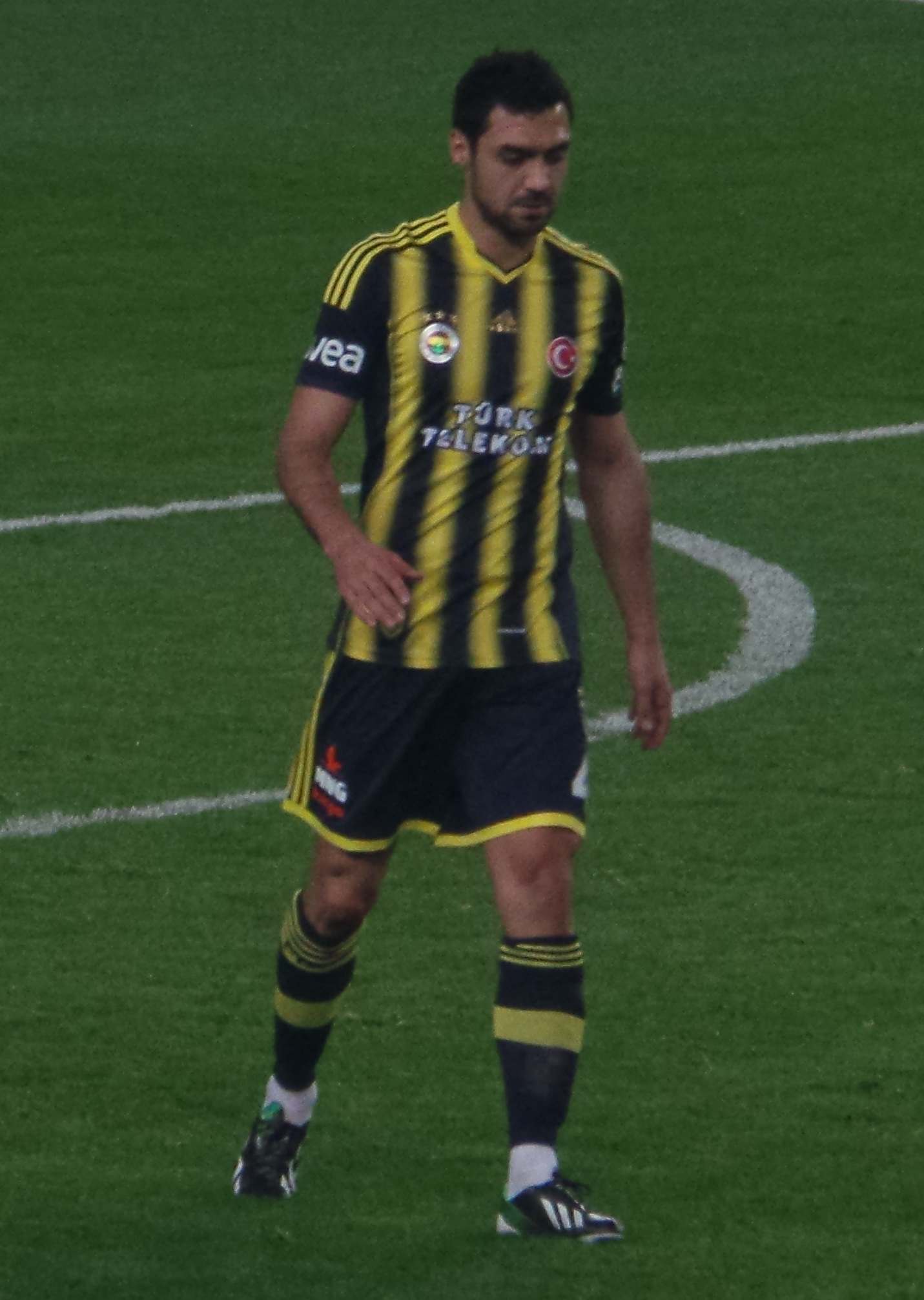 Bekir İrtegün '14